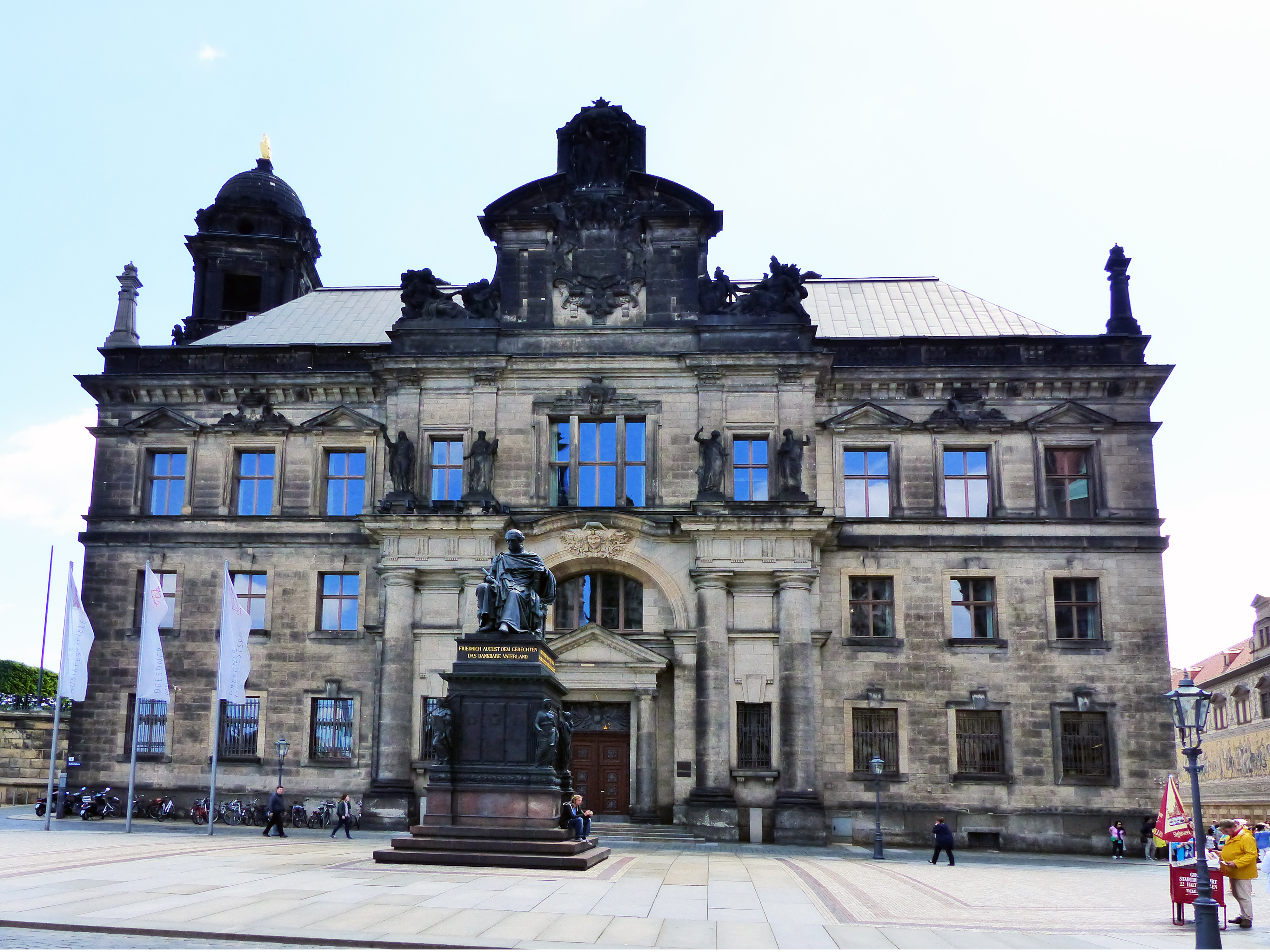 Sächsisches Ständehaus in Dresden, Sitz des Oberlandesgerichts Dresden und des Landesamtes für Denkmalpflege Sachsen, Schloßplatz 1, Dresden